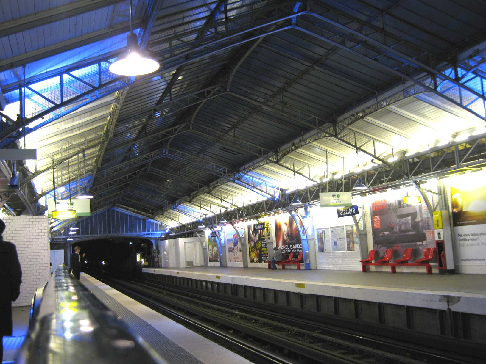 Métro de Paris, Station Glacière(ligne 6), Paris, France